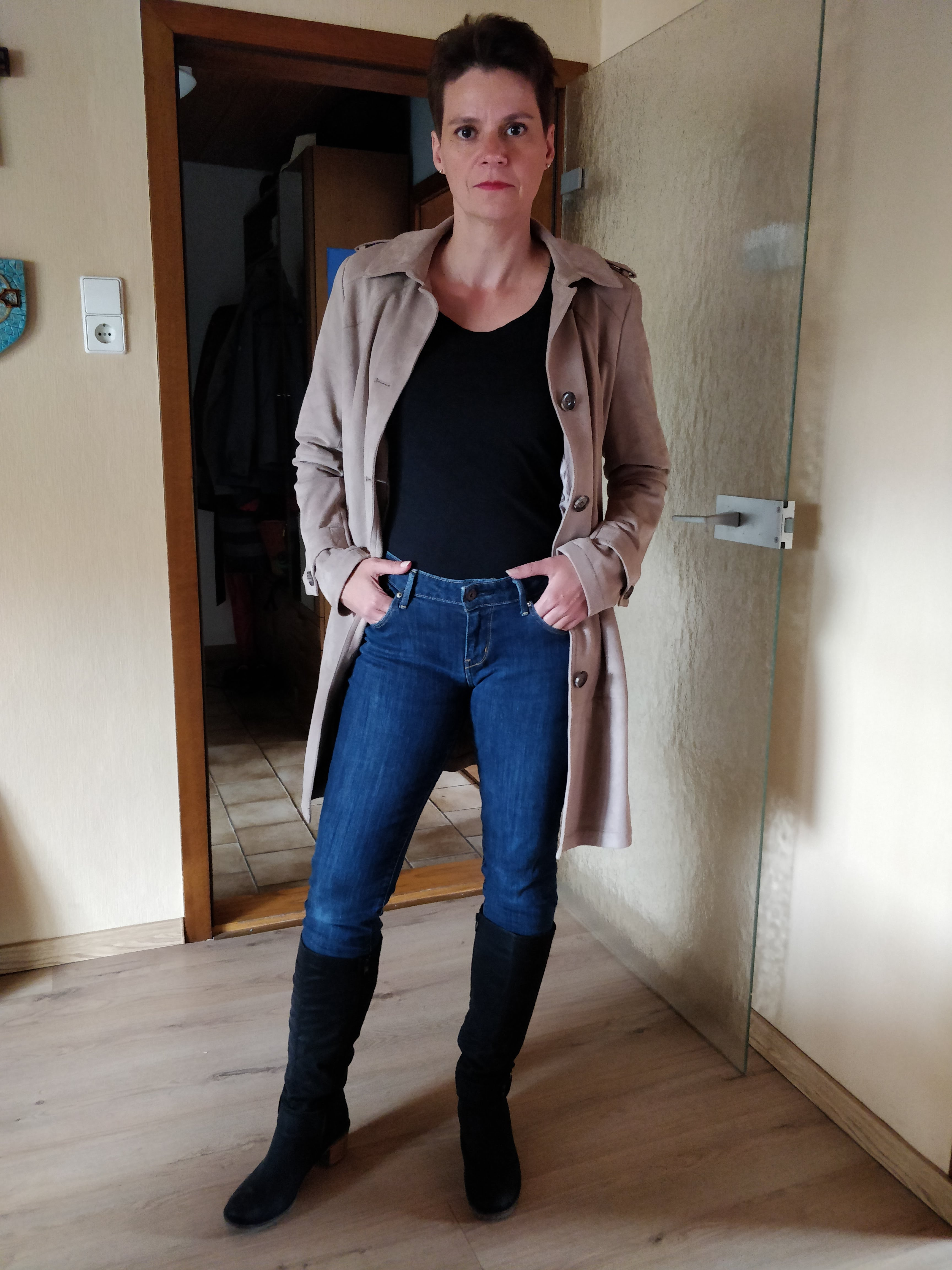 Kostümprobe Kommissarin für ein Casting 2018